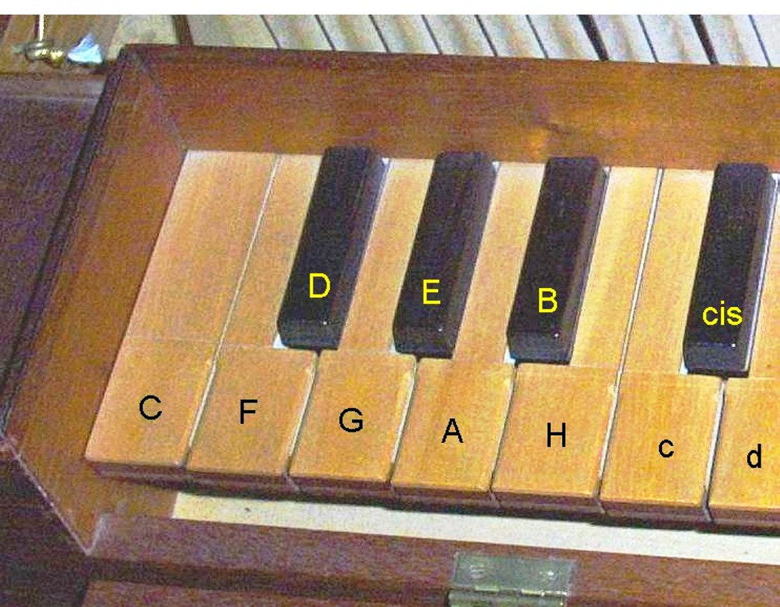 Clavichord mit kurzer Oktave und Beschriftung